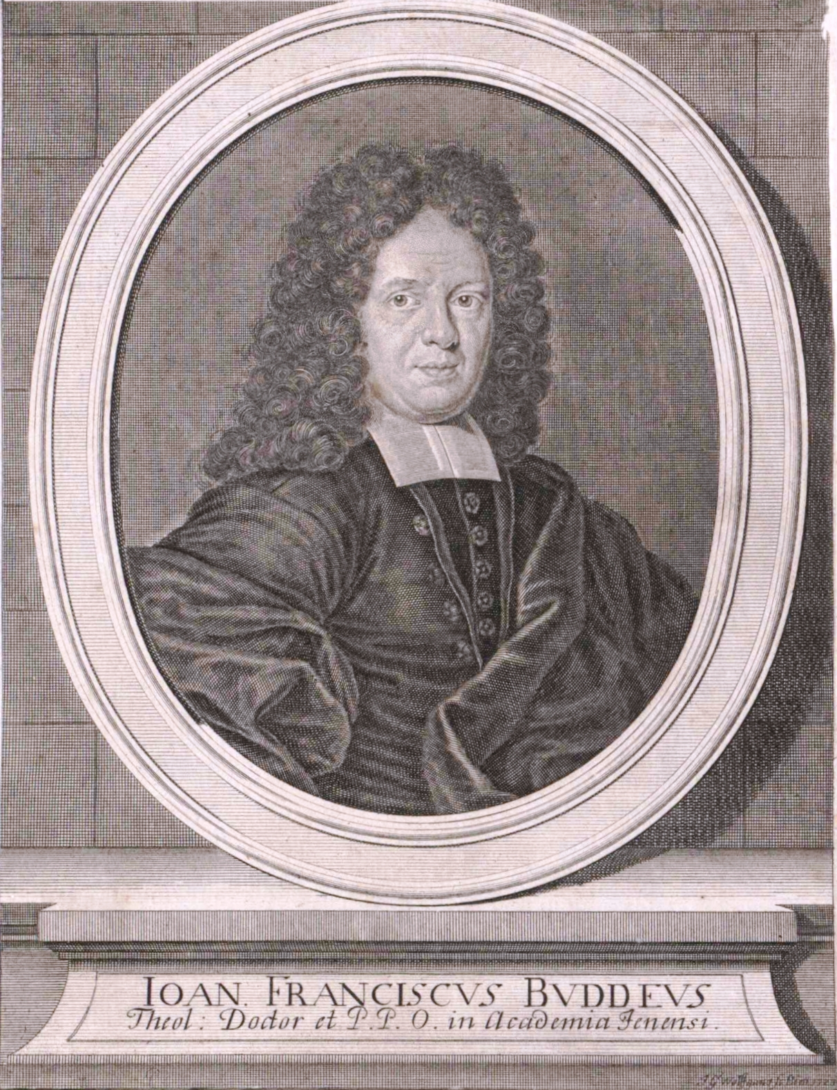 Johann Franz Buddeus (1667-1729) Ehtnologe und evangelischer Theologe